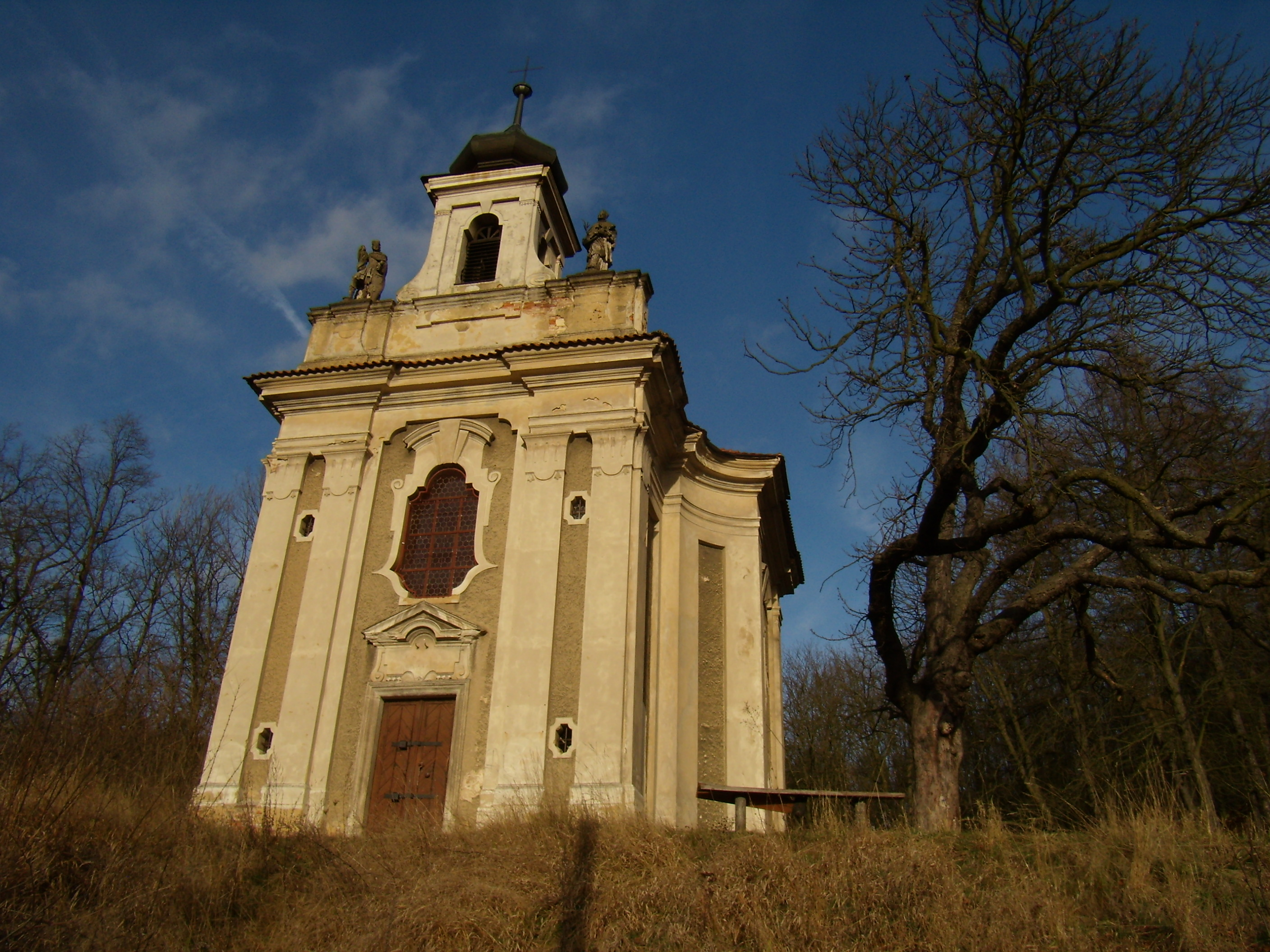 Radnice - kaple Navštívení Panny Marie na Kalvárii (K. I. Dienzenhofer)